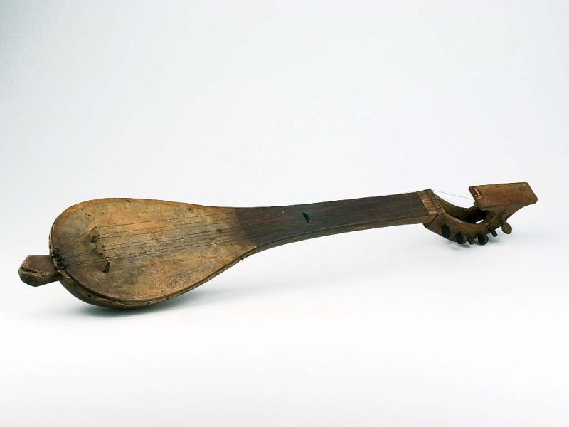 Tokkelinstrument. Korthalsluit met zeven snaren Unknown language: Gambus